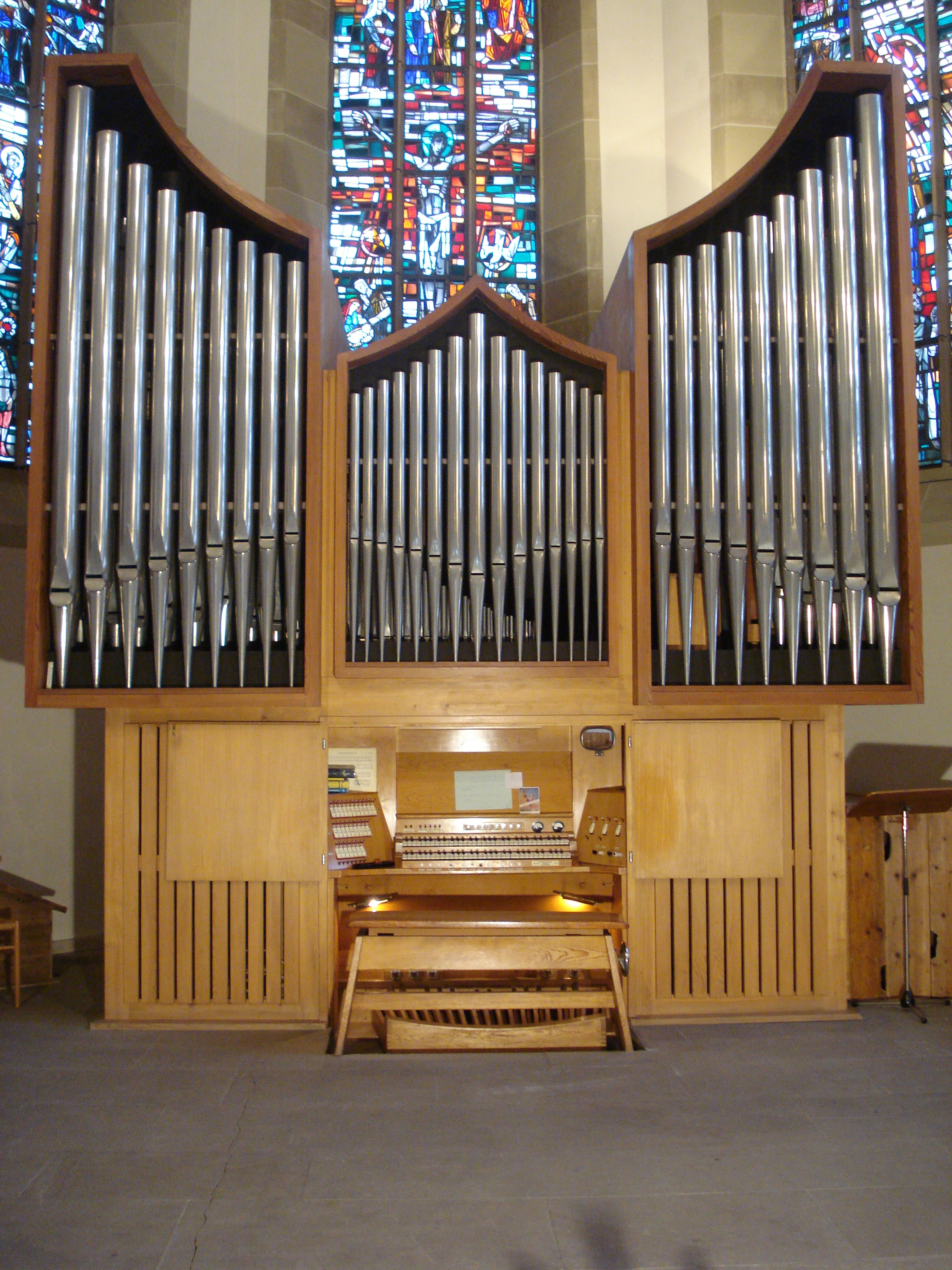 Weigle-Orgel im Chorraum von St. Martin (Kornwestheim)